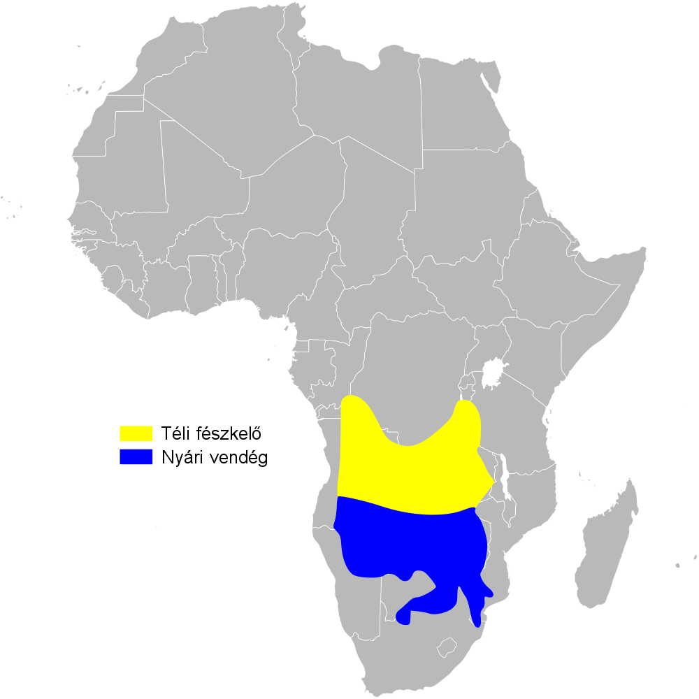 Pinarocorys nigricans distribution map, based on